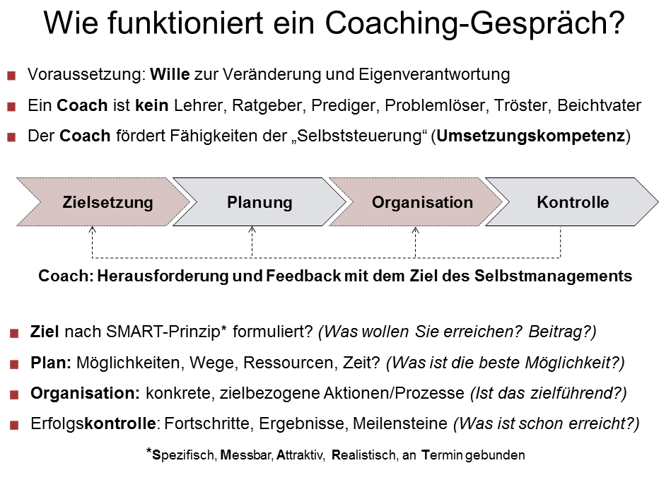 Wie ein Coaching-Gespräch funktioniert